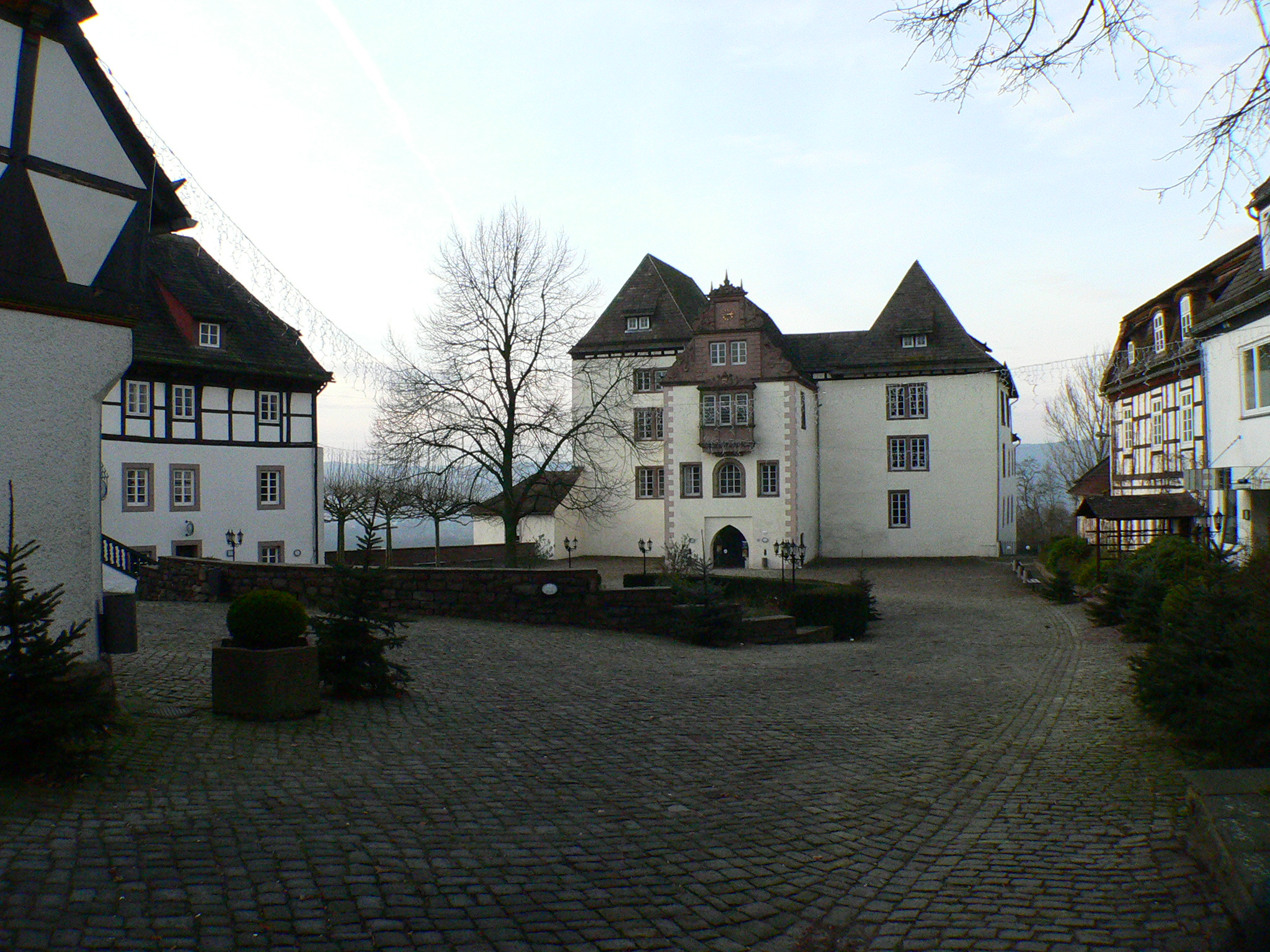 Schloss Fürstenberg (Weser), Sitz der Porzellanmanufaktur Fürstenberg